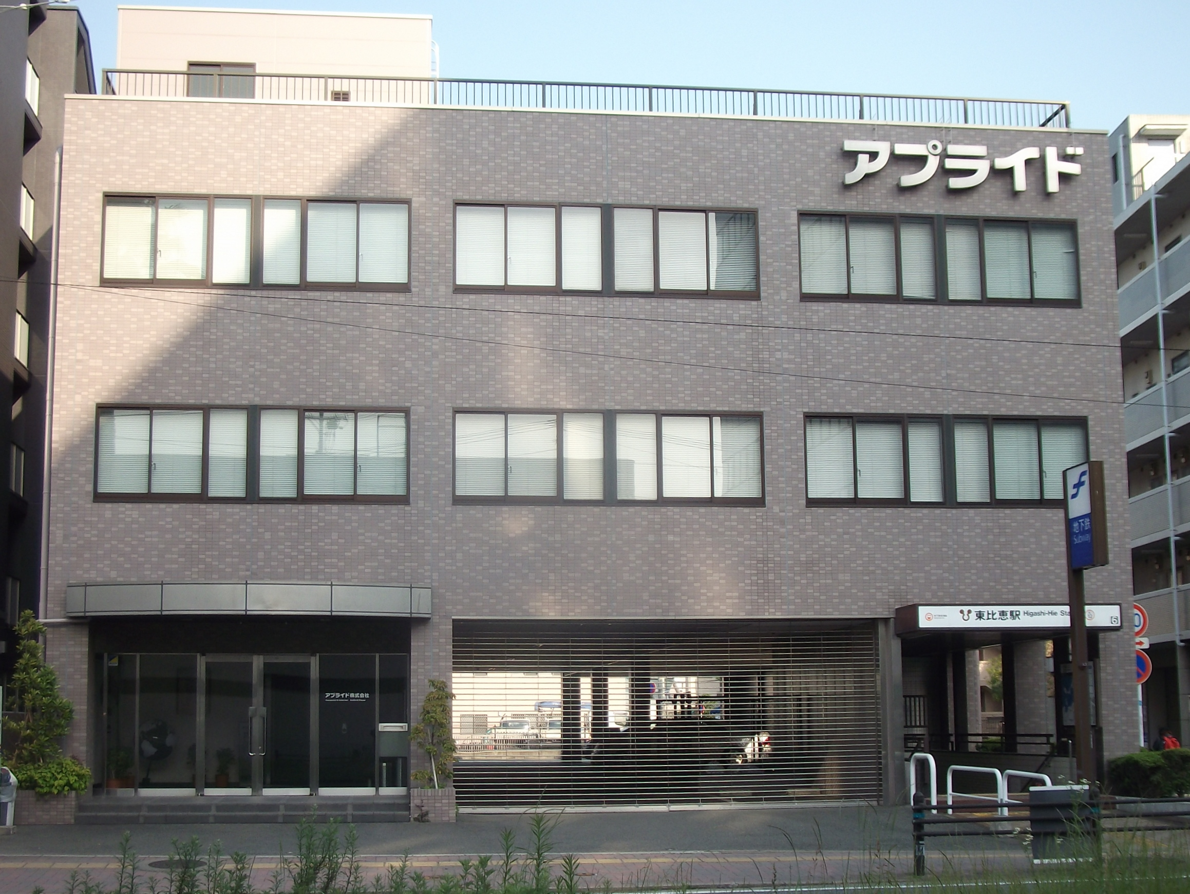 アプライド本社（福岡市博多区東比恵）。